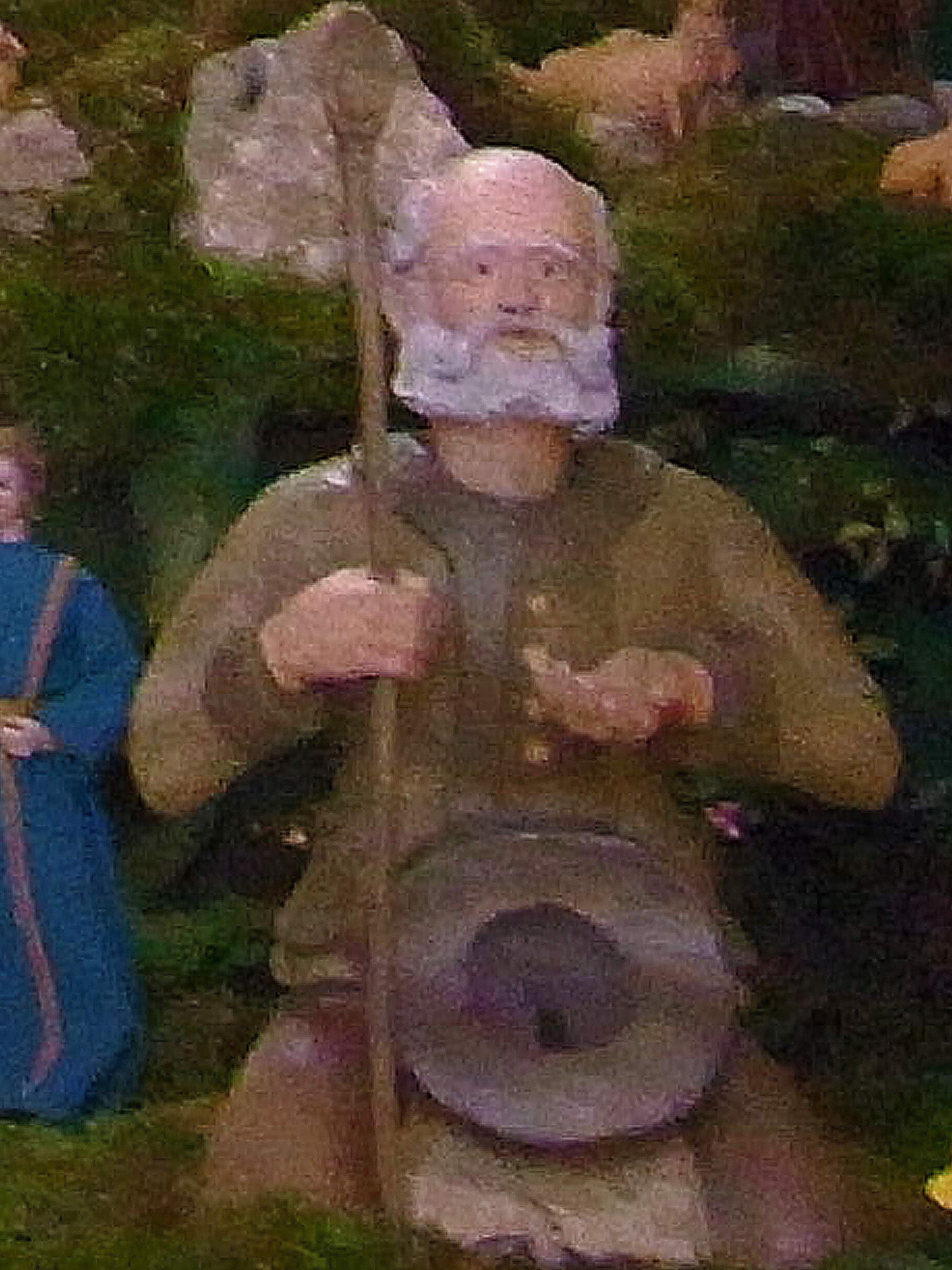 Bettler als Almosenbox. Früher wurden bei Krippendarstellungen an dieser Stelle gerne sogenannte Nickneger eingesetzt. Ob dies auch in Weggental der Fall war ist mir nicht bekannt. Die Krippe wurde um das Jahr 1835/40 von Leopold Lazaro für die Waldhorn-Wirtin Kreszentia Fischer geschaffen. Diese stiftete sie 1850 dem Kloster.